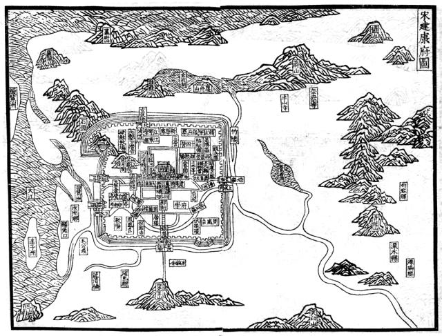 ，建康府地图